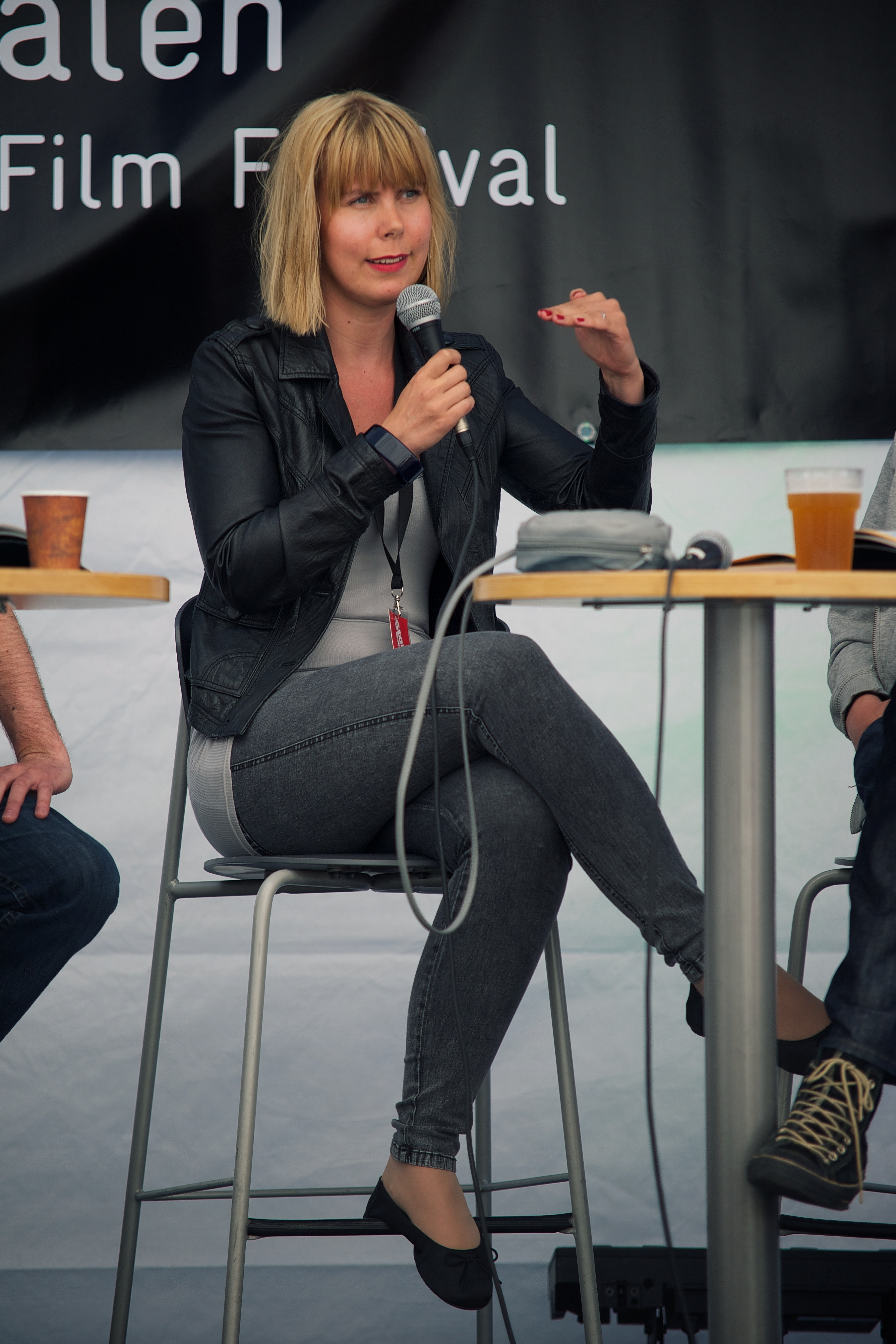 Film: Ella. Foto av Carsten Aniksdal.